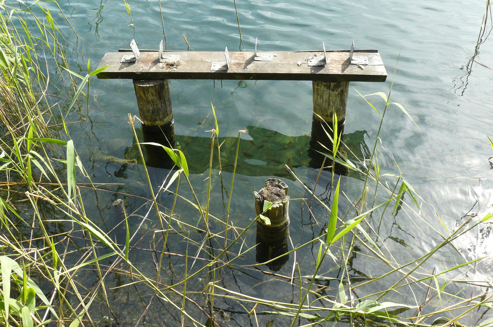 Czarne w Drwieńskim PN.